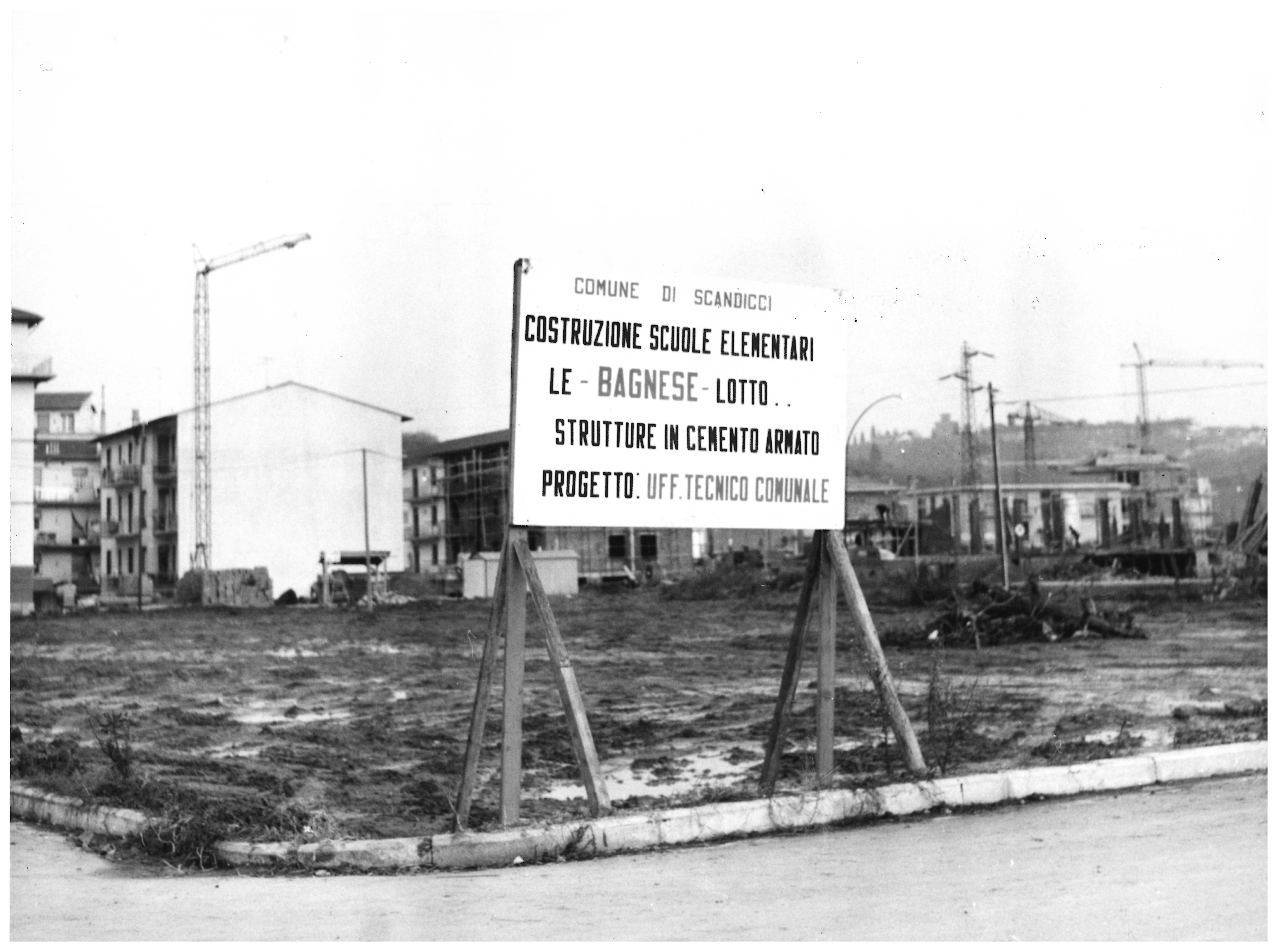 Foto del pannello di avviso di inizio dei lavori di costruzione della scuola elementare del quartiere Le Bagnese (Scandicci)